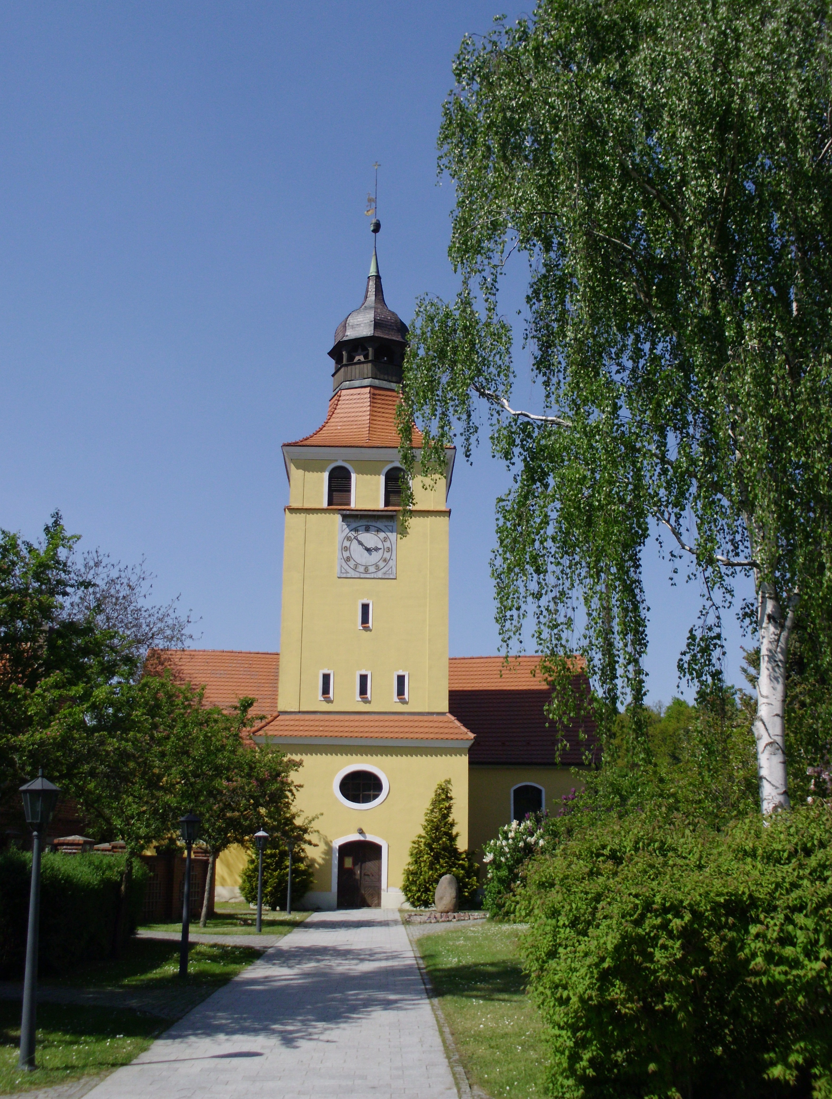 Kirche Grünefeld, Ortsteil von Schönwalde-Glien, Brandenburg, Deutschland